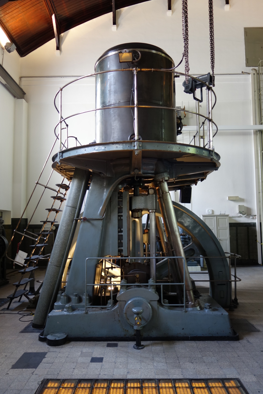 Wasserwerk Bockum - Maschine 2